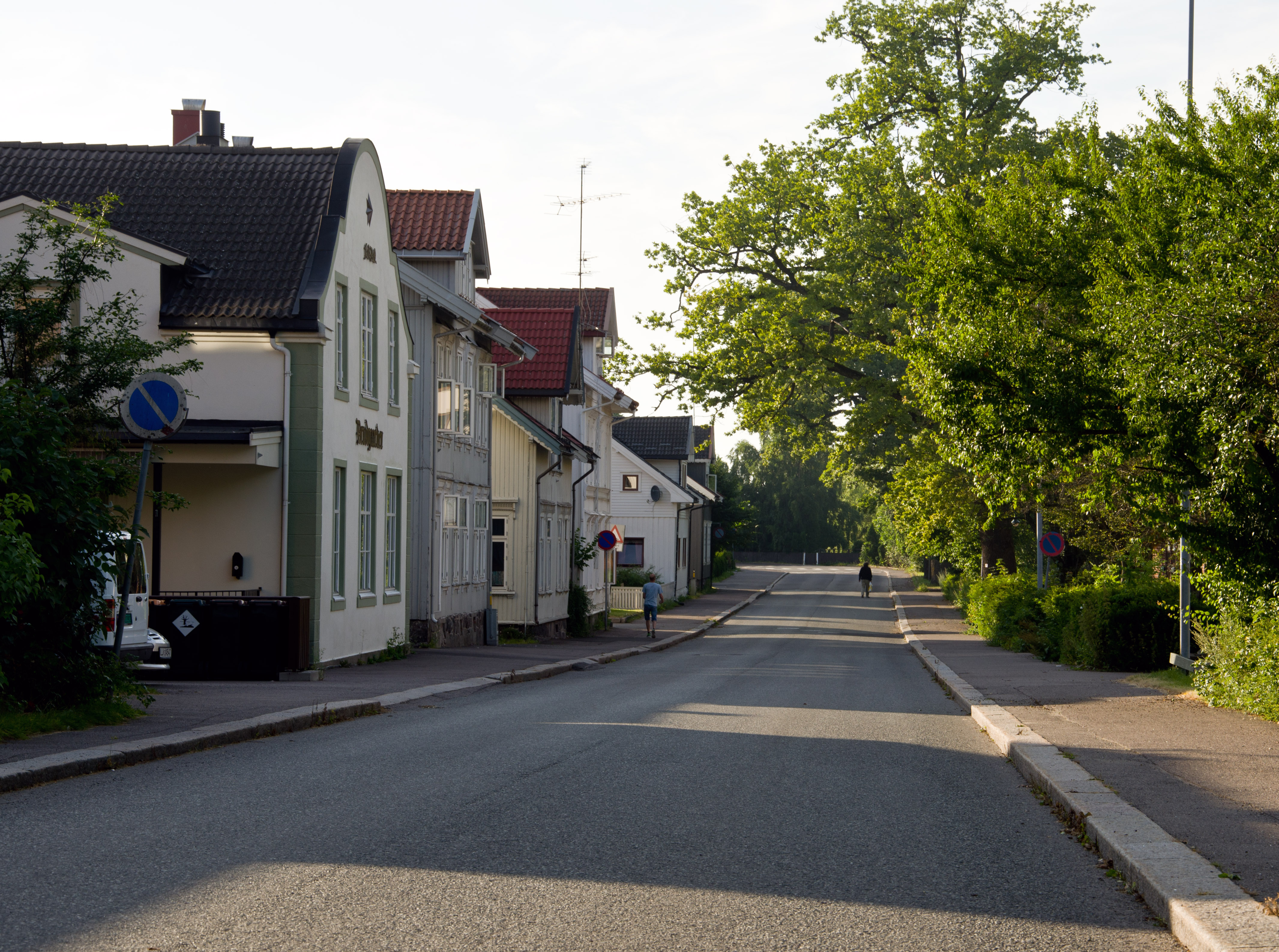 Fylkesvei 712 Bekkegata, Horten